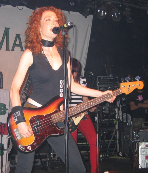 Melissa Auf der Maur in der Frankfurter Batschkapp im September 2004